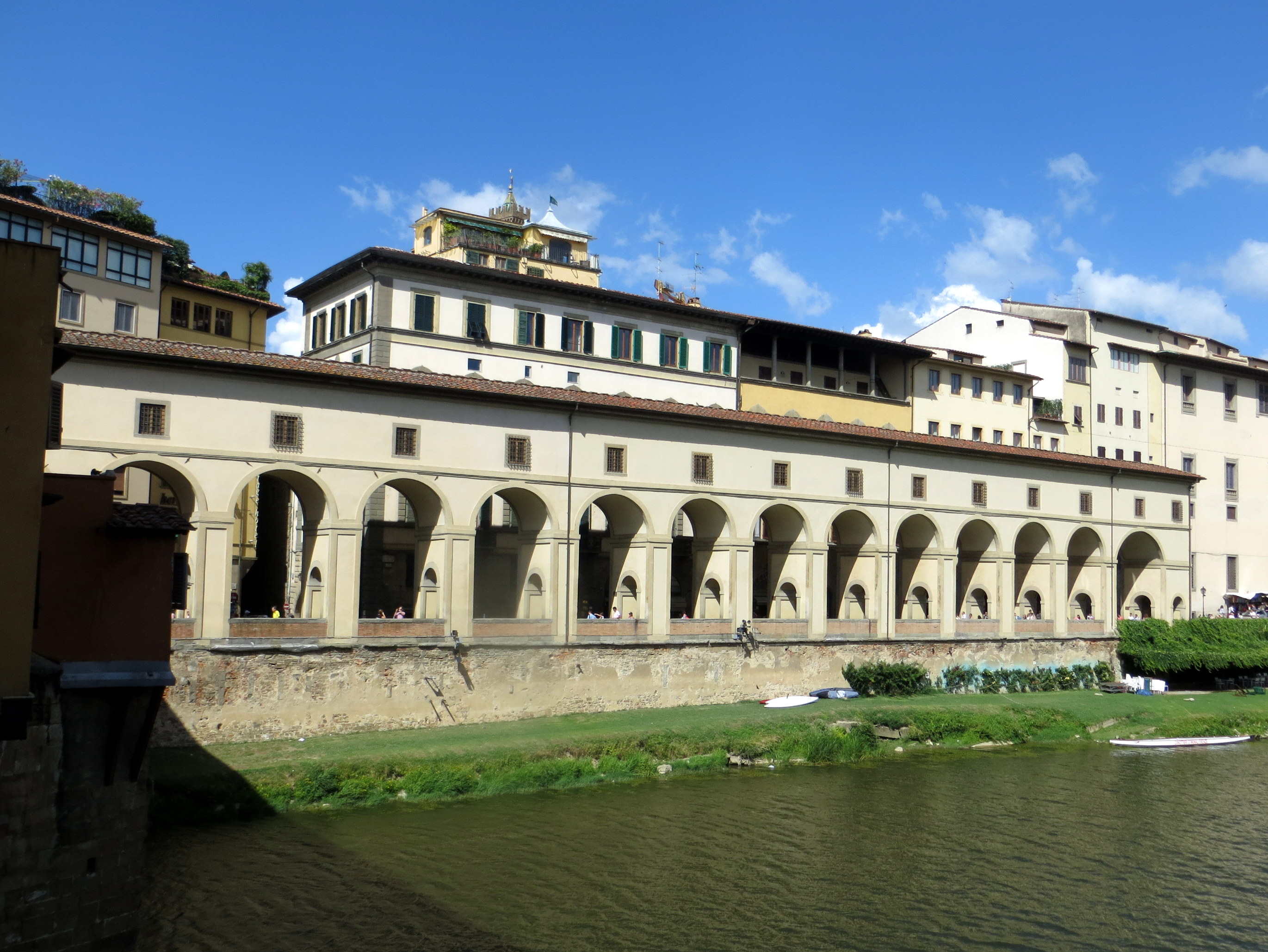 Corridoio Vasariano vicino al Ponte Vecchio